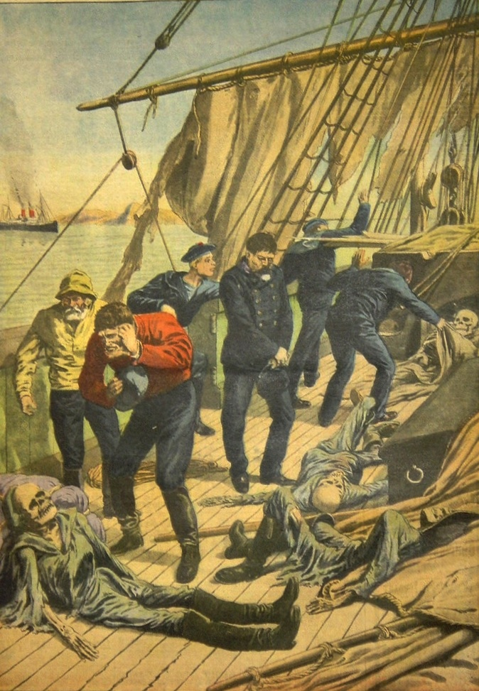 Illustration de la découverte de l'épave du Marlborough en 1913. Vaisseau fantôme